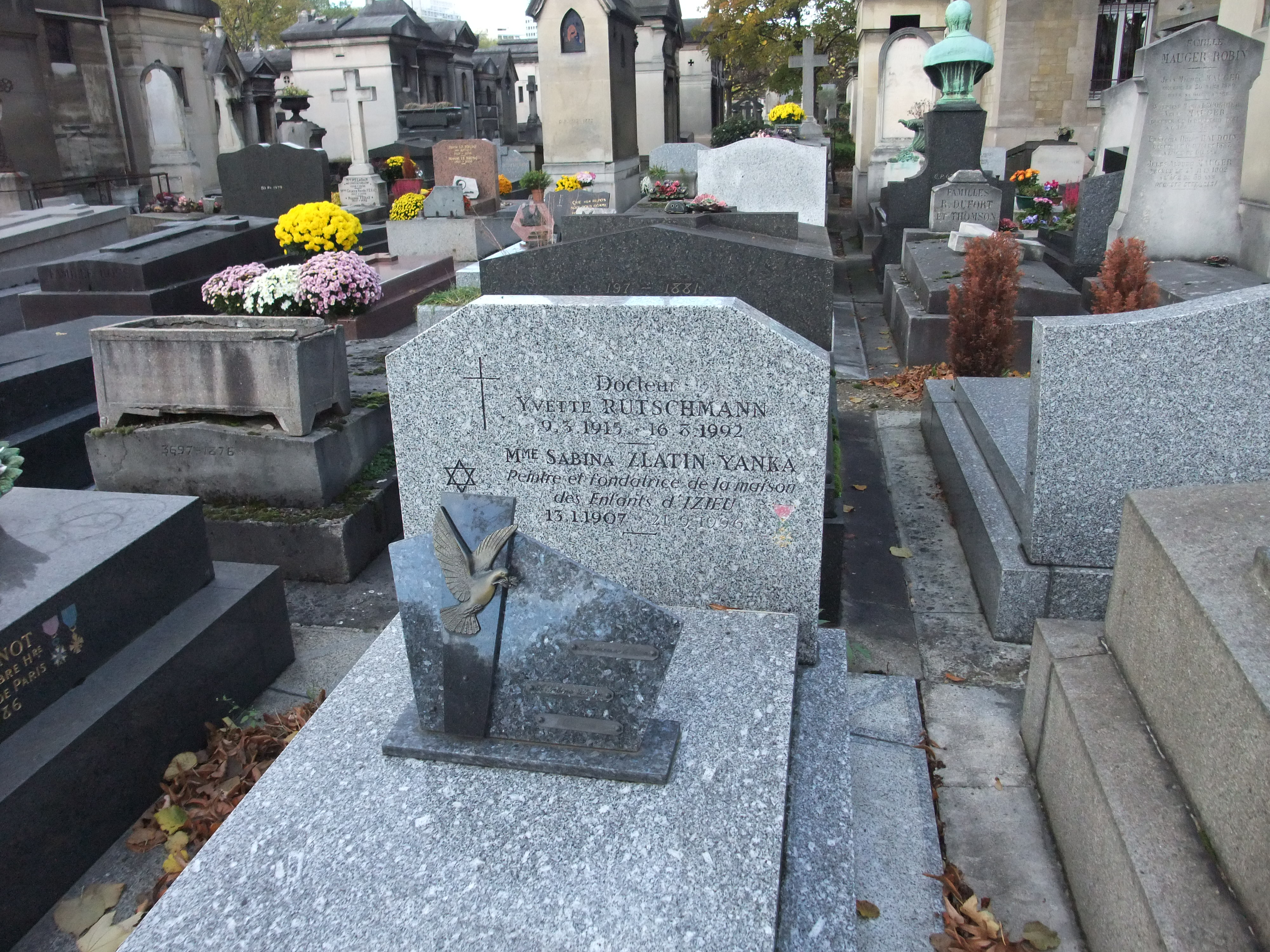 tombe au cimetière Montparnasse, Paris